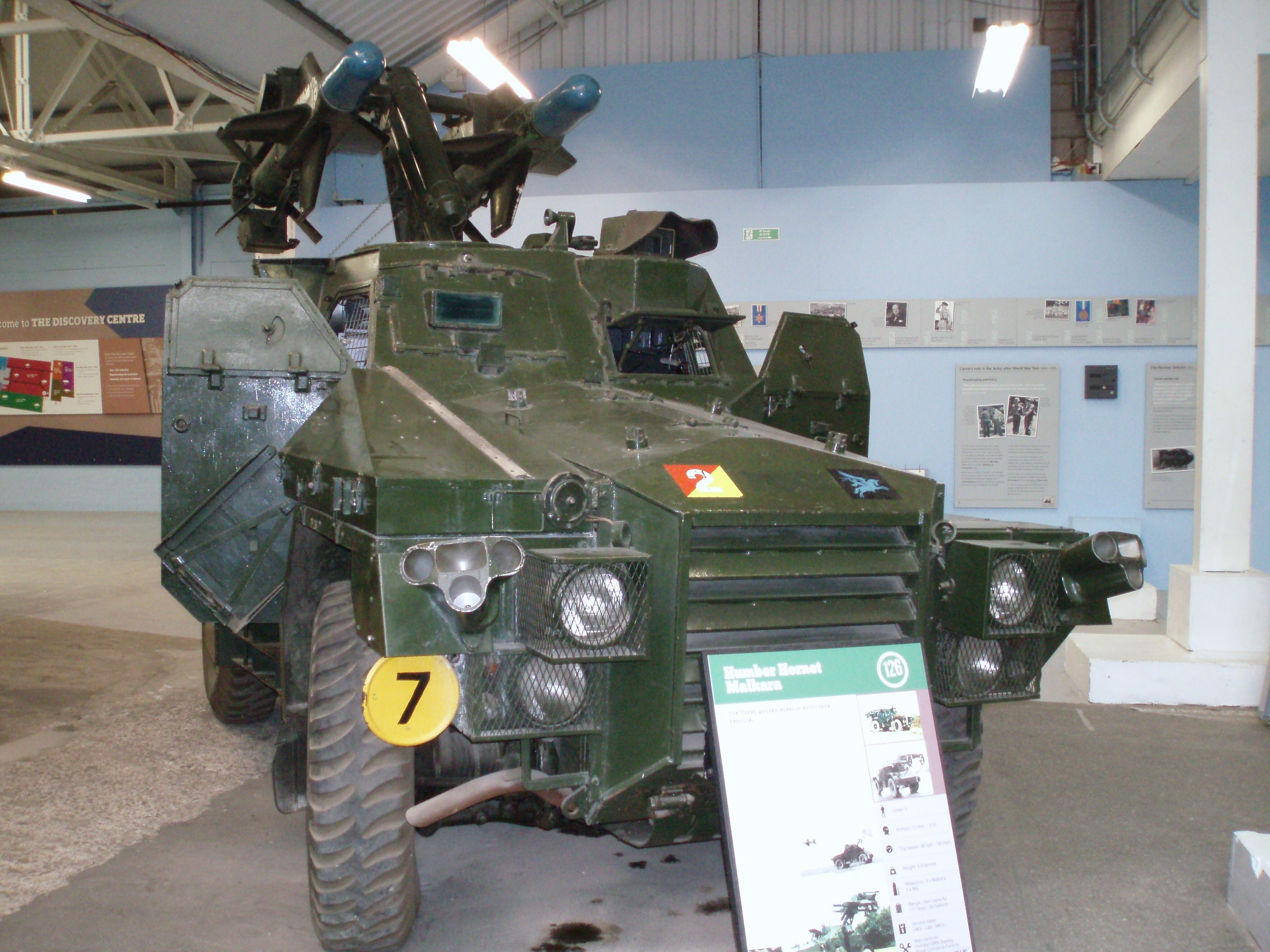 Bovington Tank Museum 345 humber hornet malkara